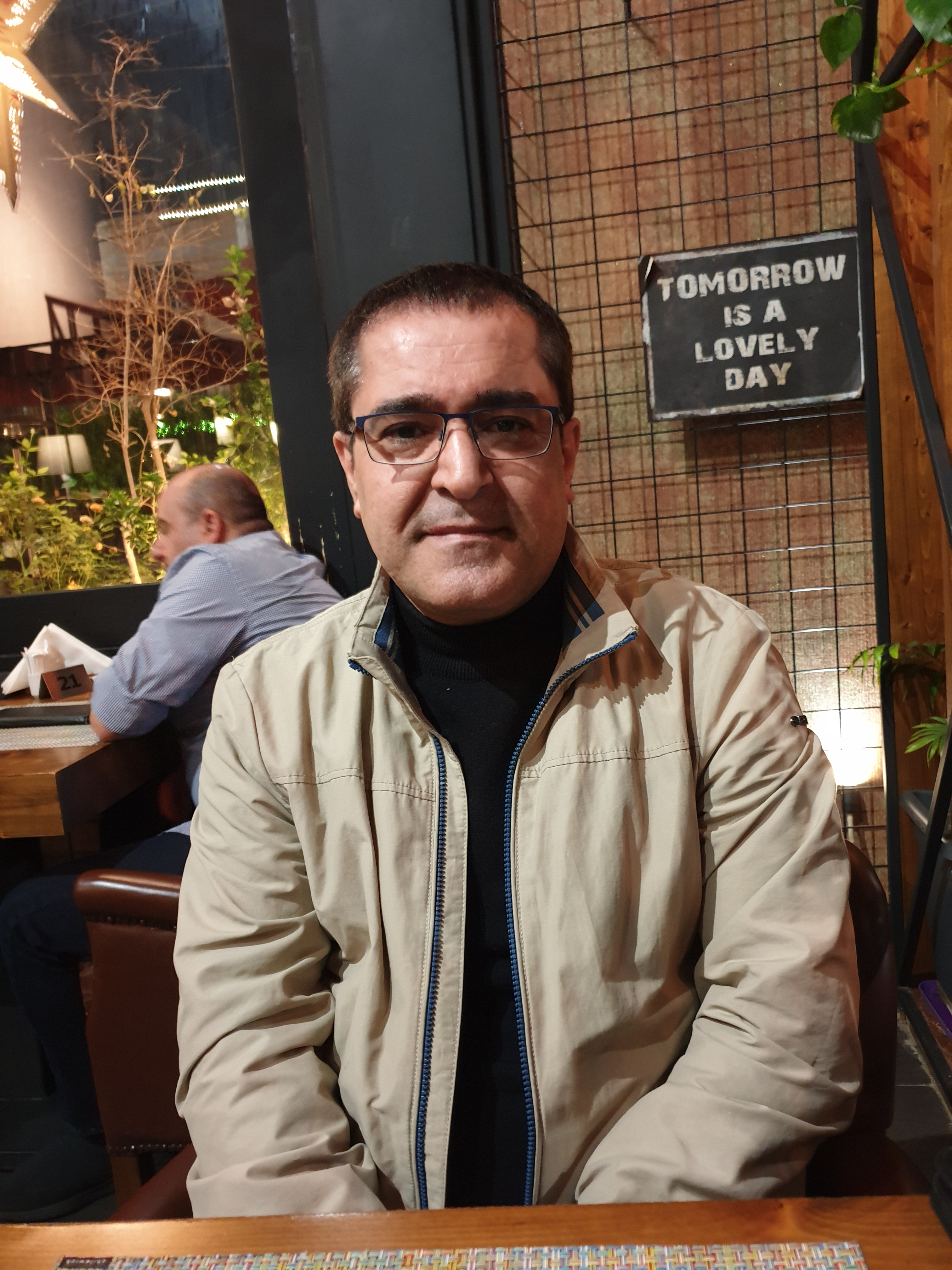 صورة لعضو البرلمان العراقي رابون معروف